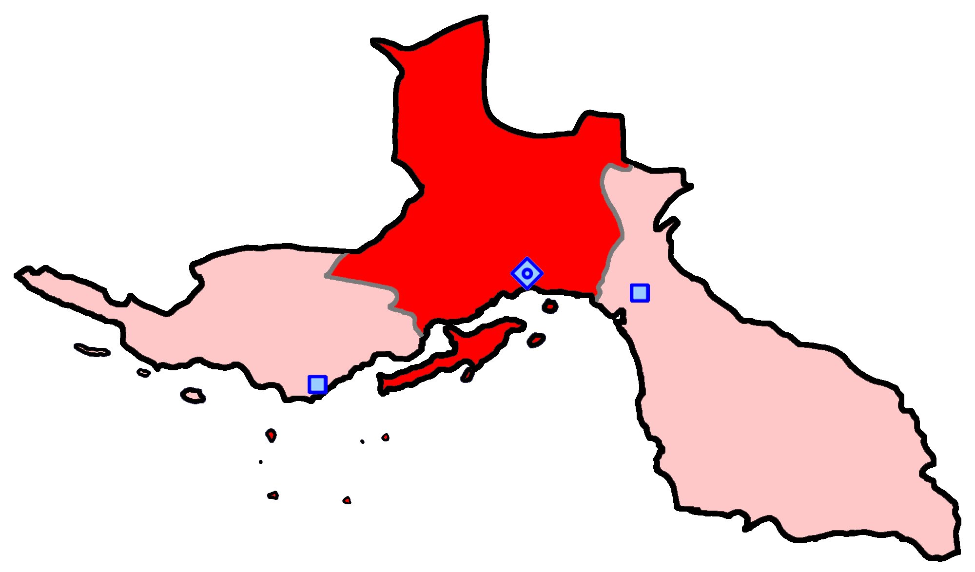 حوزهٔ انتخاباتی بندرعباس و قشم و ابوموسی و حاجی‌آباد و خمیر برای انتخابات مجلس شورای اسلامی